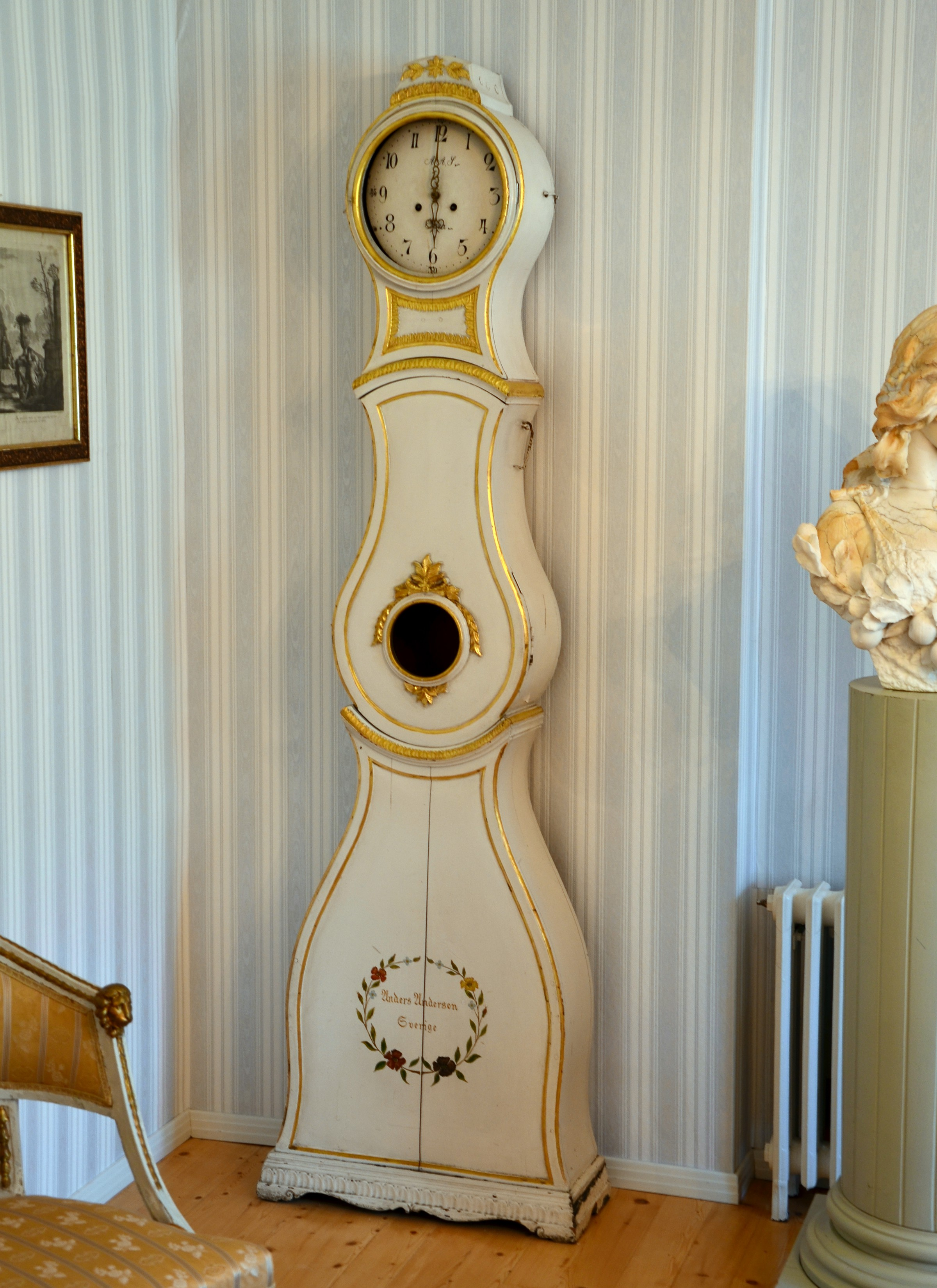 Moraklocka, Söderlångviks museum, Finland Söderlångvik manor Native nameSöderlångviks museumParent institutionAmos Anderson Art MuseumLocationKimito island, FinlandCoordinates60° 02′ 00″ N, 22° 26′ 00″ E Established1961Web page control : Q6581530 institution QS:P195,Q6581530